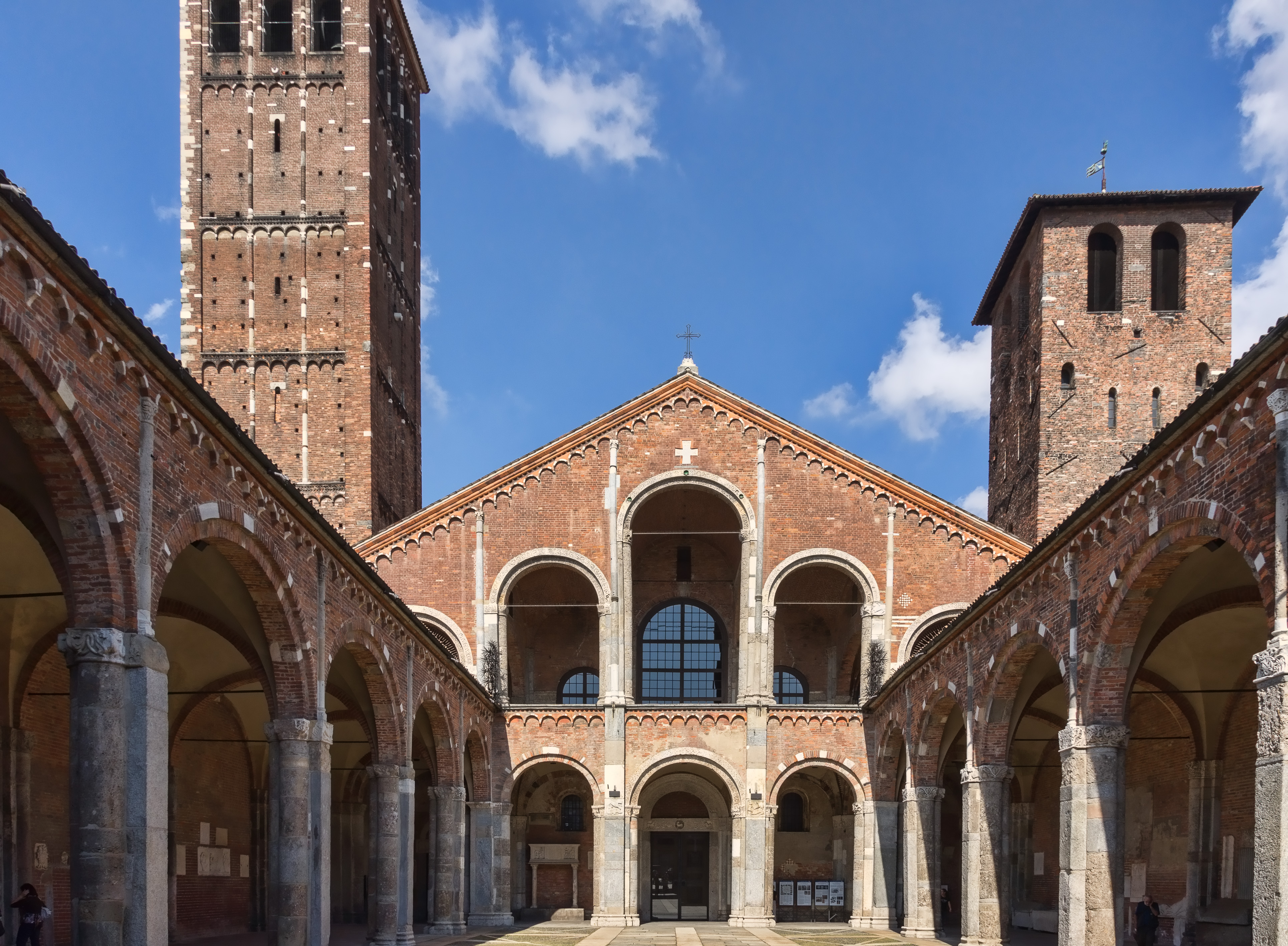 Milan - Saint Ambroise - Atrium